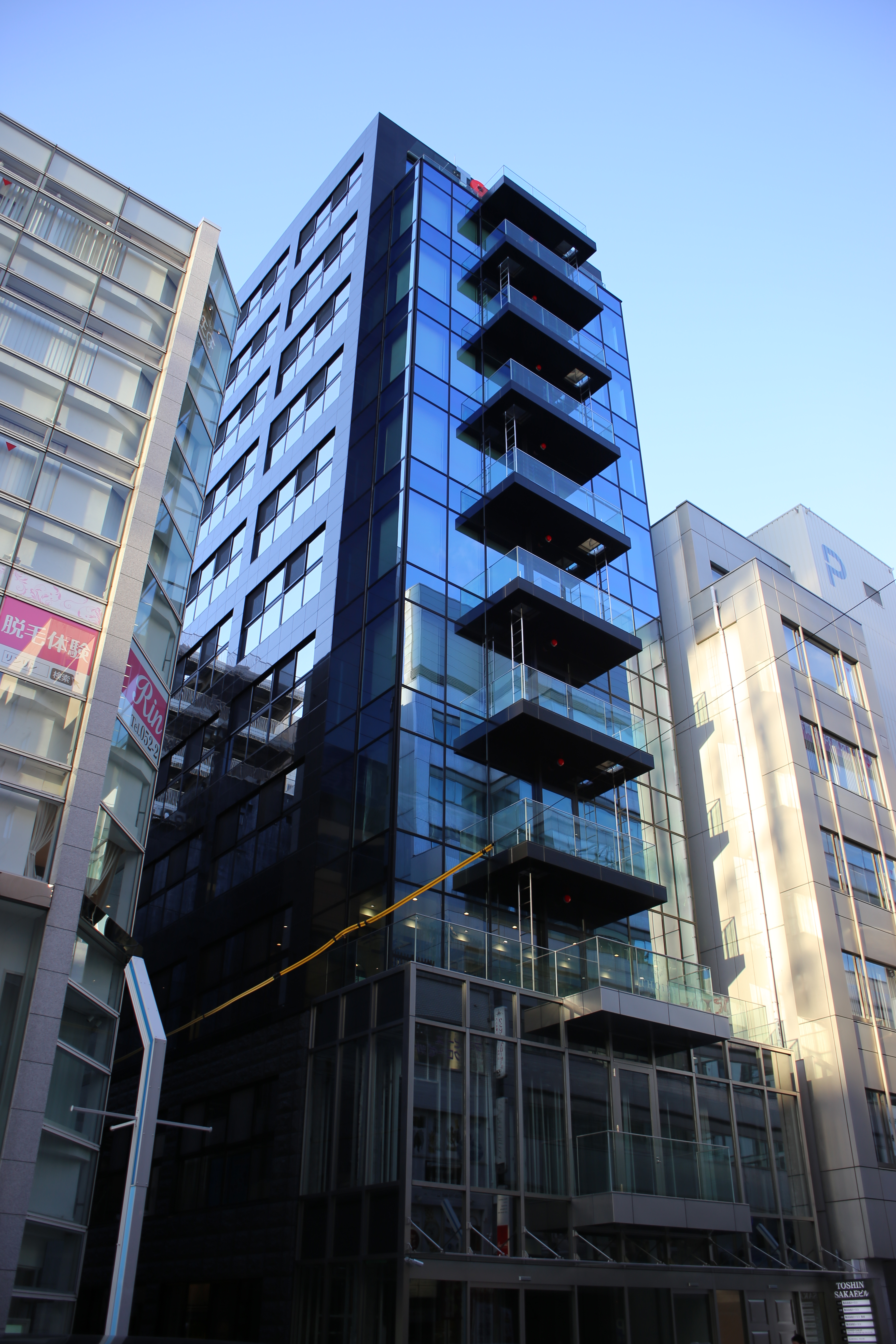 名古屋市中区栄三丁目のトーシン本社ビルを南側公道西側より撮影